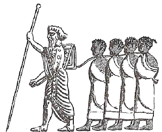 Traite orientale perse dans l'antiquité, d'après Theodor Flathe, G. F. Herzberg, Ferdinand Justi, Ferdinand von Pflügk-Harttung, M. Philippson et Hans Prütz : "Allgemeine Weltgeschichte", Grote'sche Verlagsbuchhandlung, Berlin 1885.